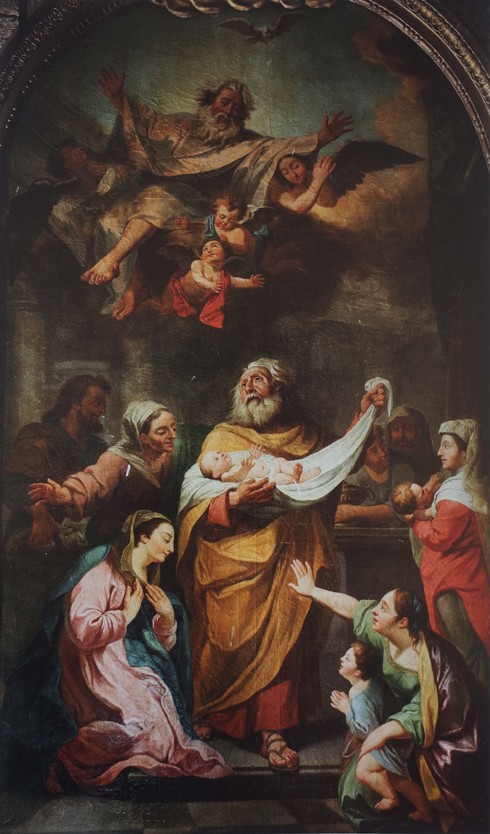 Tableau de l'église Saint-Just, Arbois, 1780.